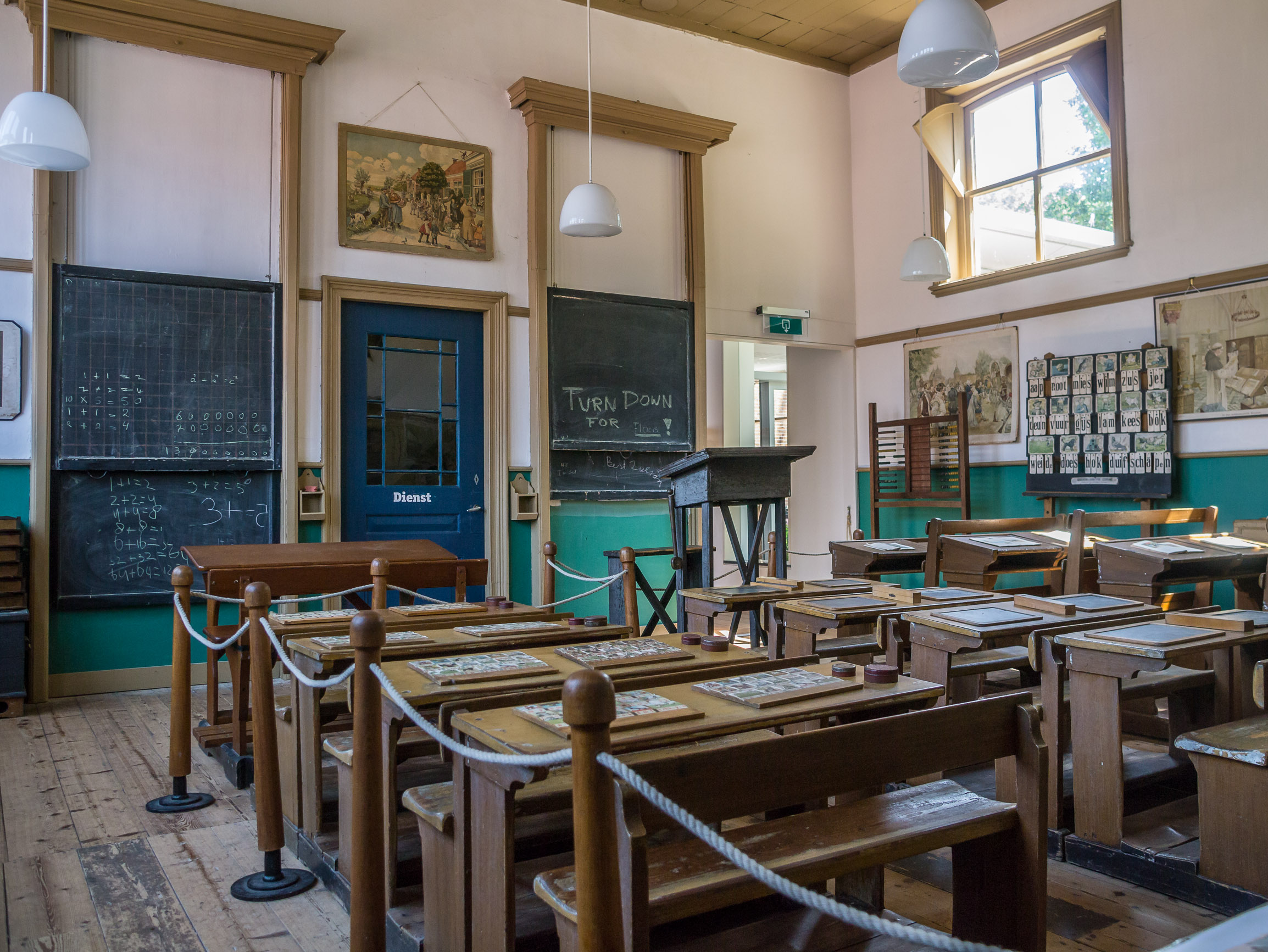 Het Hoogeland openluchtmuseum in Warffum, oud klaslokaal